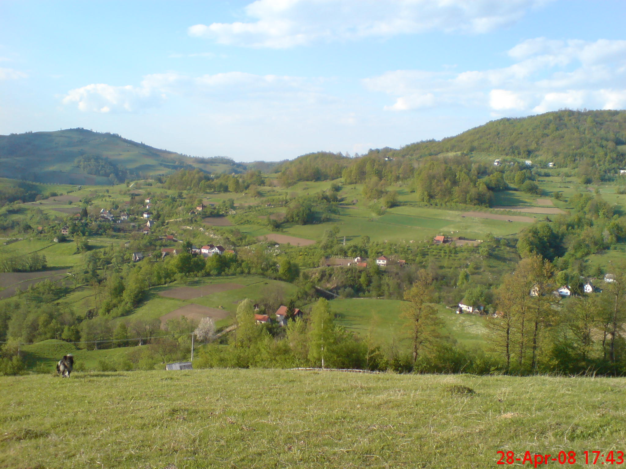 Panorama - Koprivno ( Mikan )